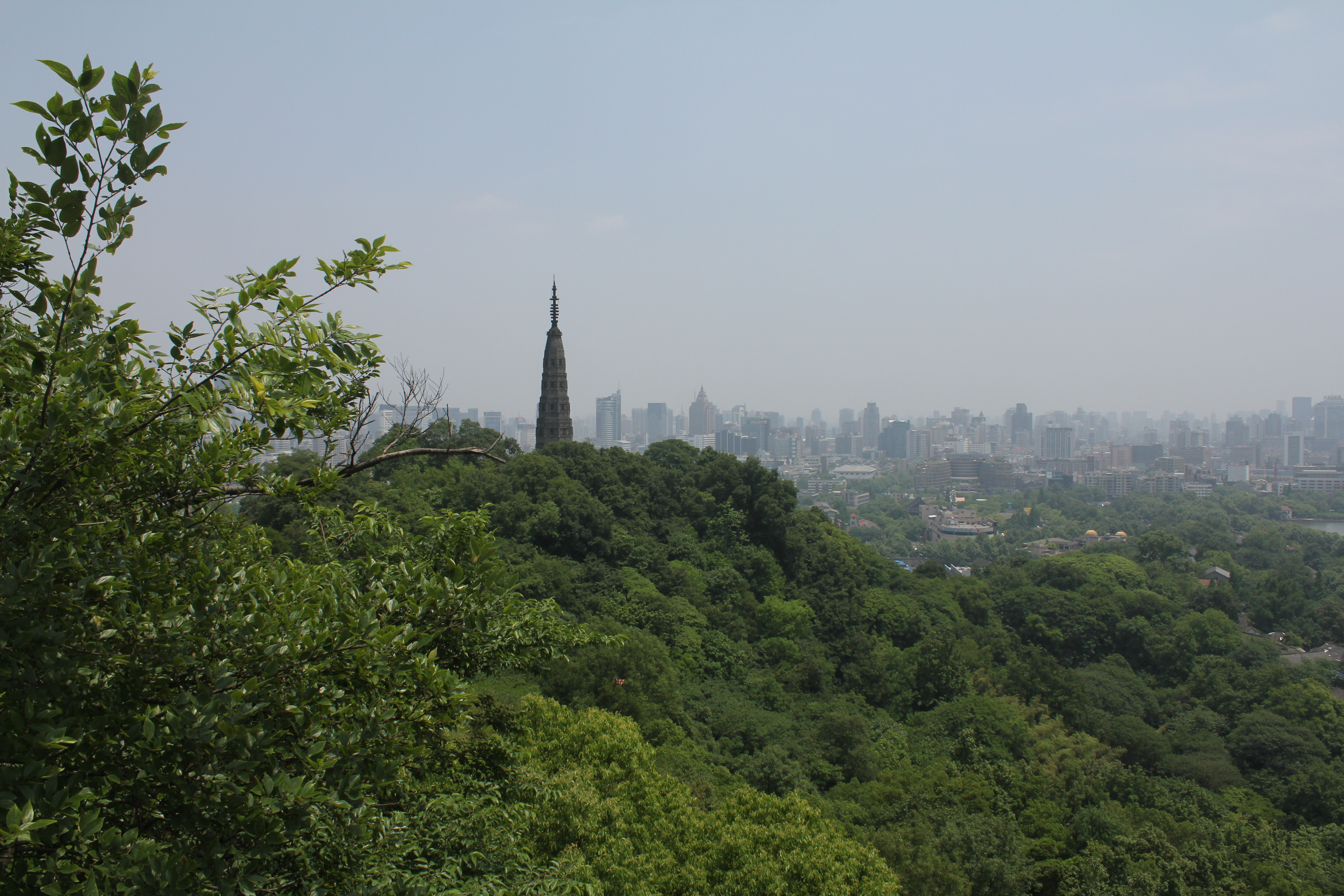 从宝石山上眺望保俶塔，此为杭州西湖景观中的一部分。